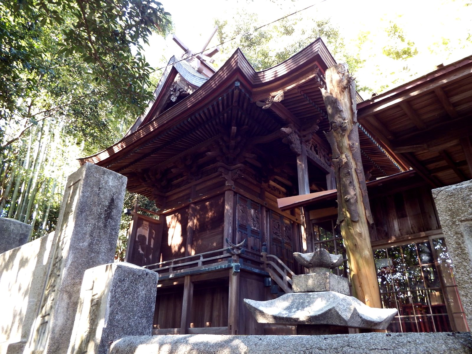 黒嶋神宮 本殿